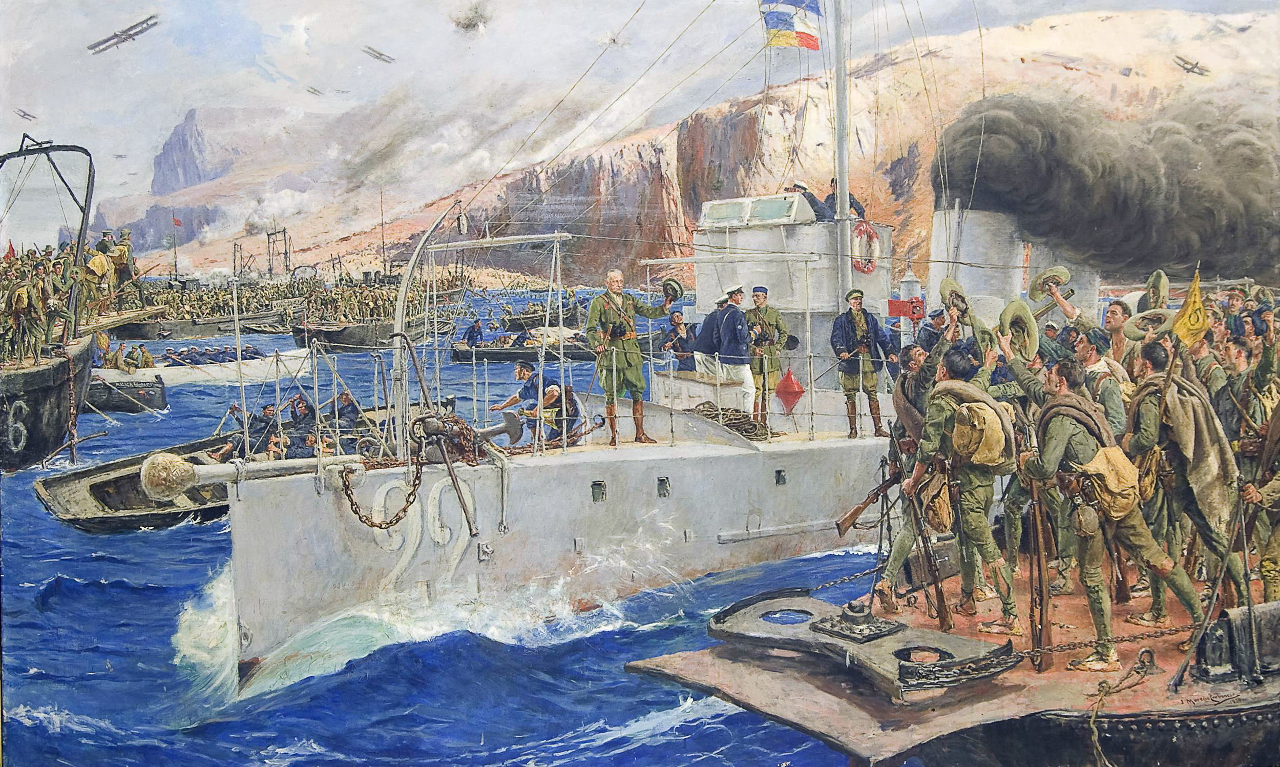 El desembarco de la Armada española en la bahía de Alhucemas tuvo lugar el 8 de septiembre de 1925, bajo la dirección del general Miguel Primo de Rivera, y supuso el fin de la guerra de España contra Marruecos. Sobre cubierta del torpedero 22 aparecen los generales Miguel Primo de Rivera (1870-1930) y José Sanjurjo Sacanell (1872-1936), y al fondo aparece la montaña del Morro Nuevo.